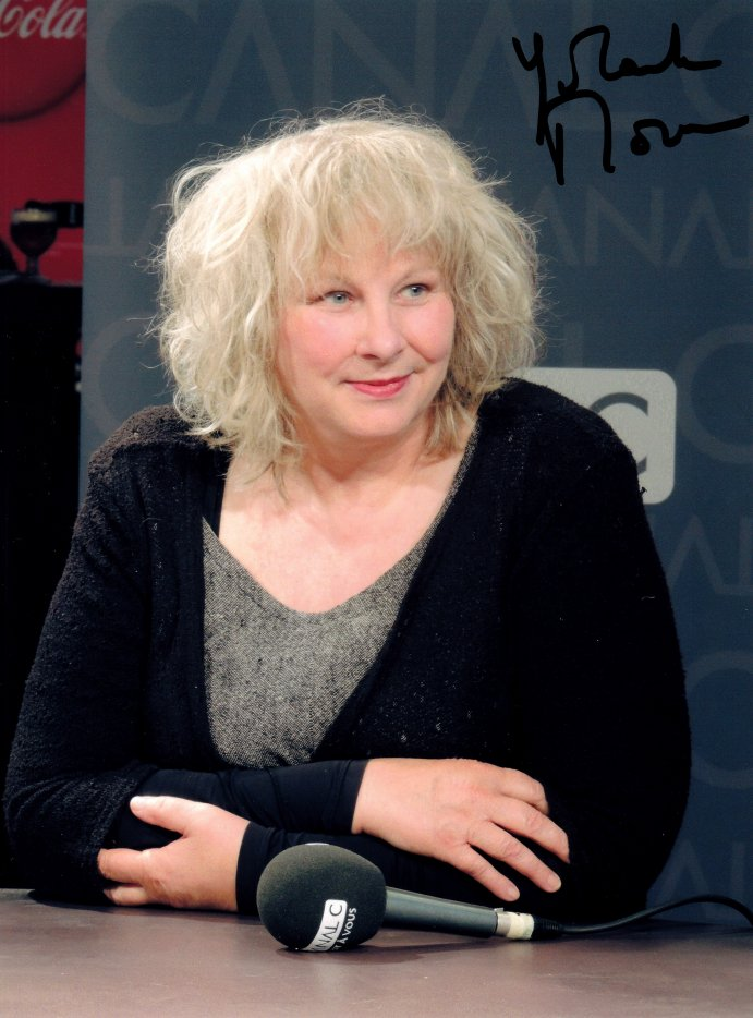 Yolande Moreau en 2013 au Festival international du film francophone de Namur